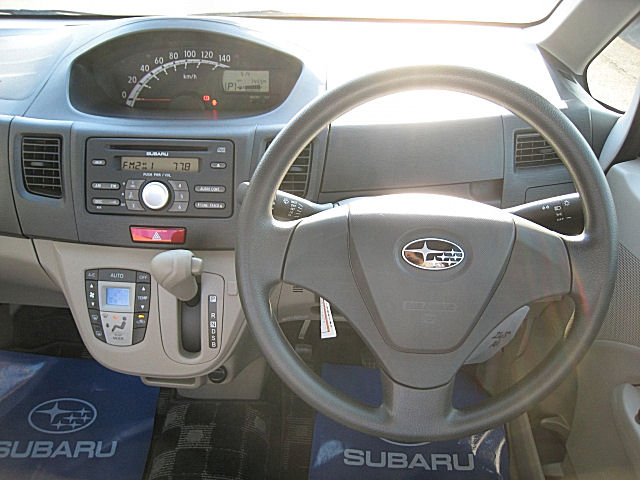 スバル ステラ L (前期型)